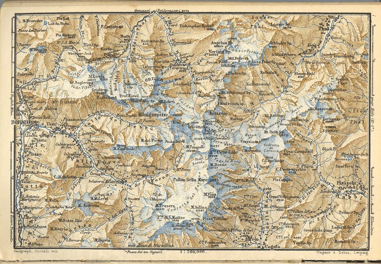 Ortleralpen_Karte